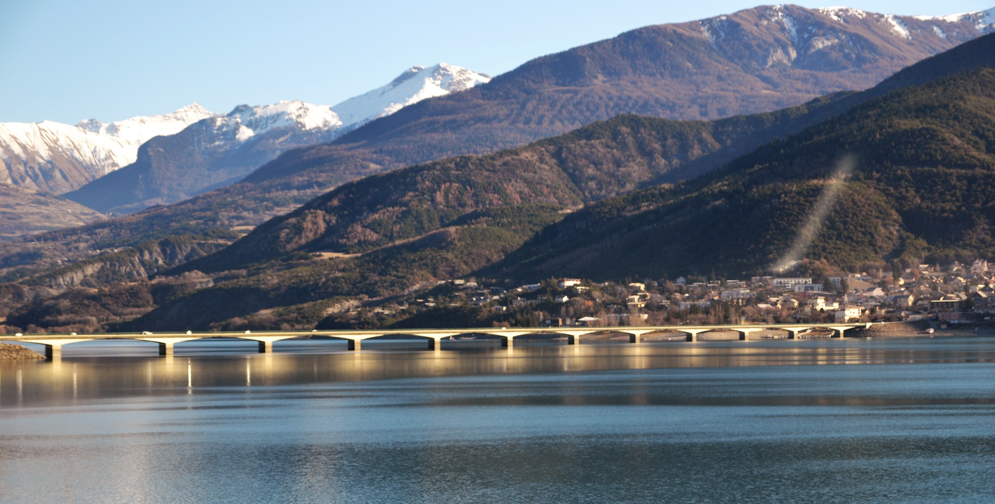 Vue du pont et du village de Savines-le-Lac, sur le lac de Serre-Ponçon.